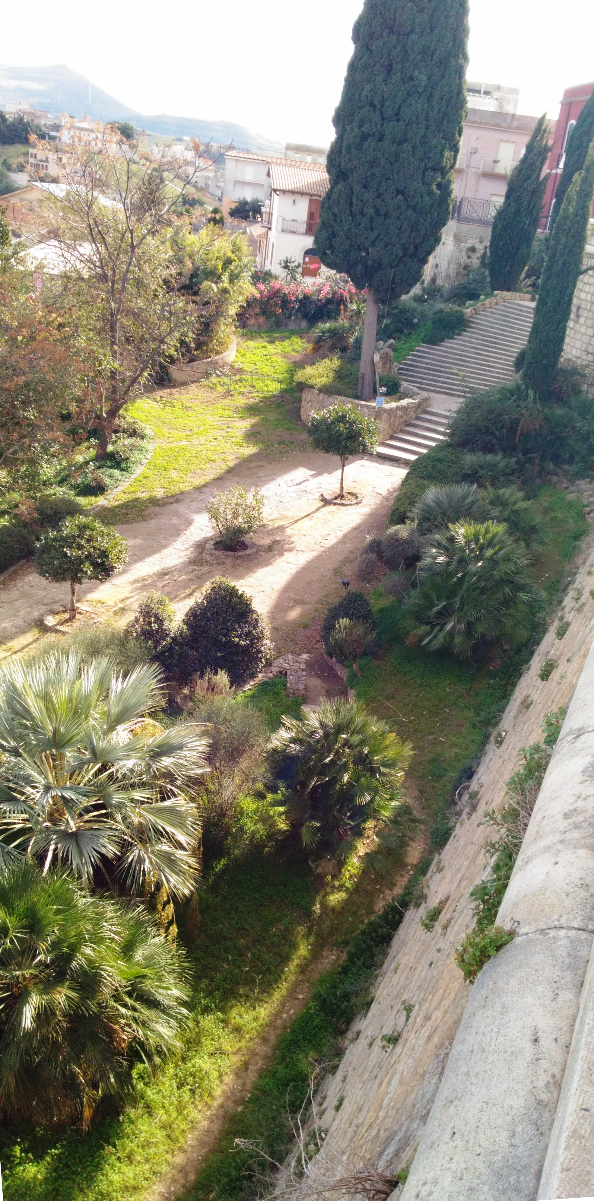 Vista da Piazza Bagolino